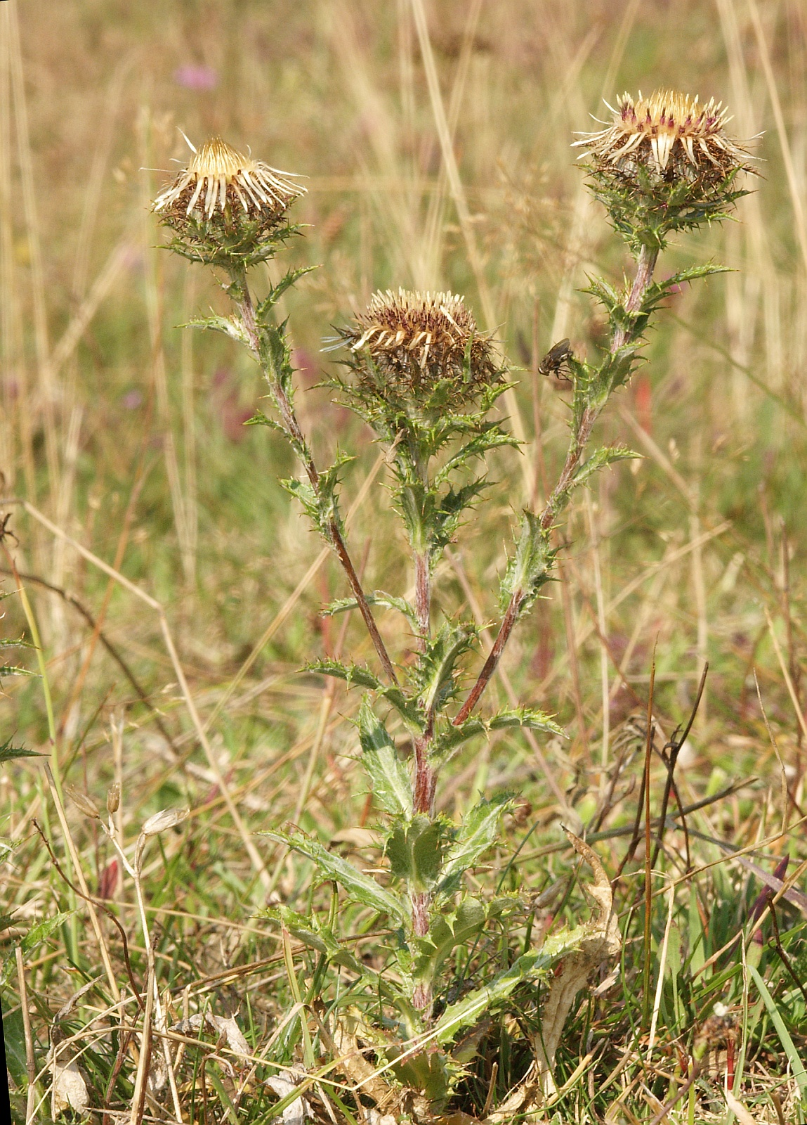 Carlina vulgaris, Frankenhöhe, Germany